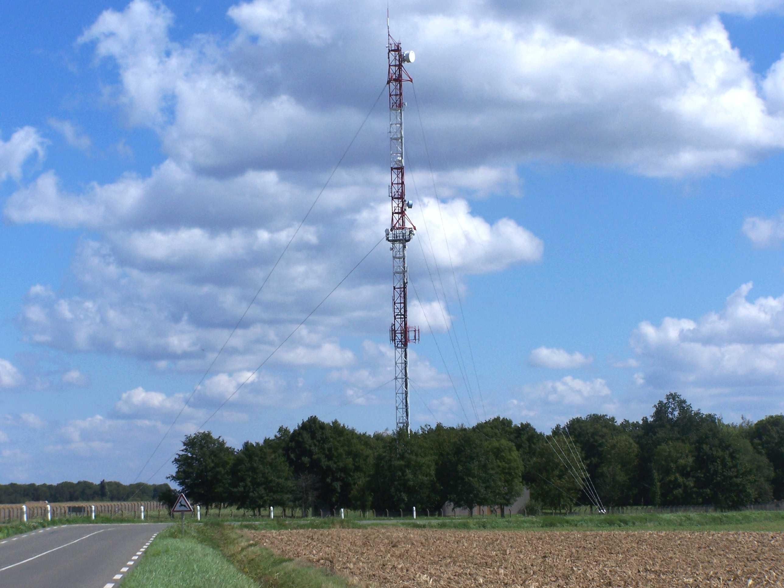 Antenne-relais de radio-télévision des Alluets-le-Roi (Yvelines, France)